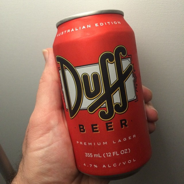 Eine Dose Duff-Bier von "Die Simpsons"